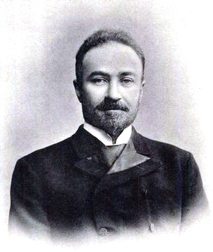 Крым, Соломон Самойлович